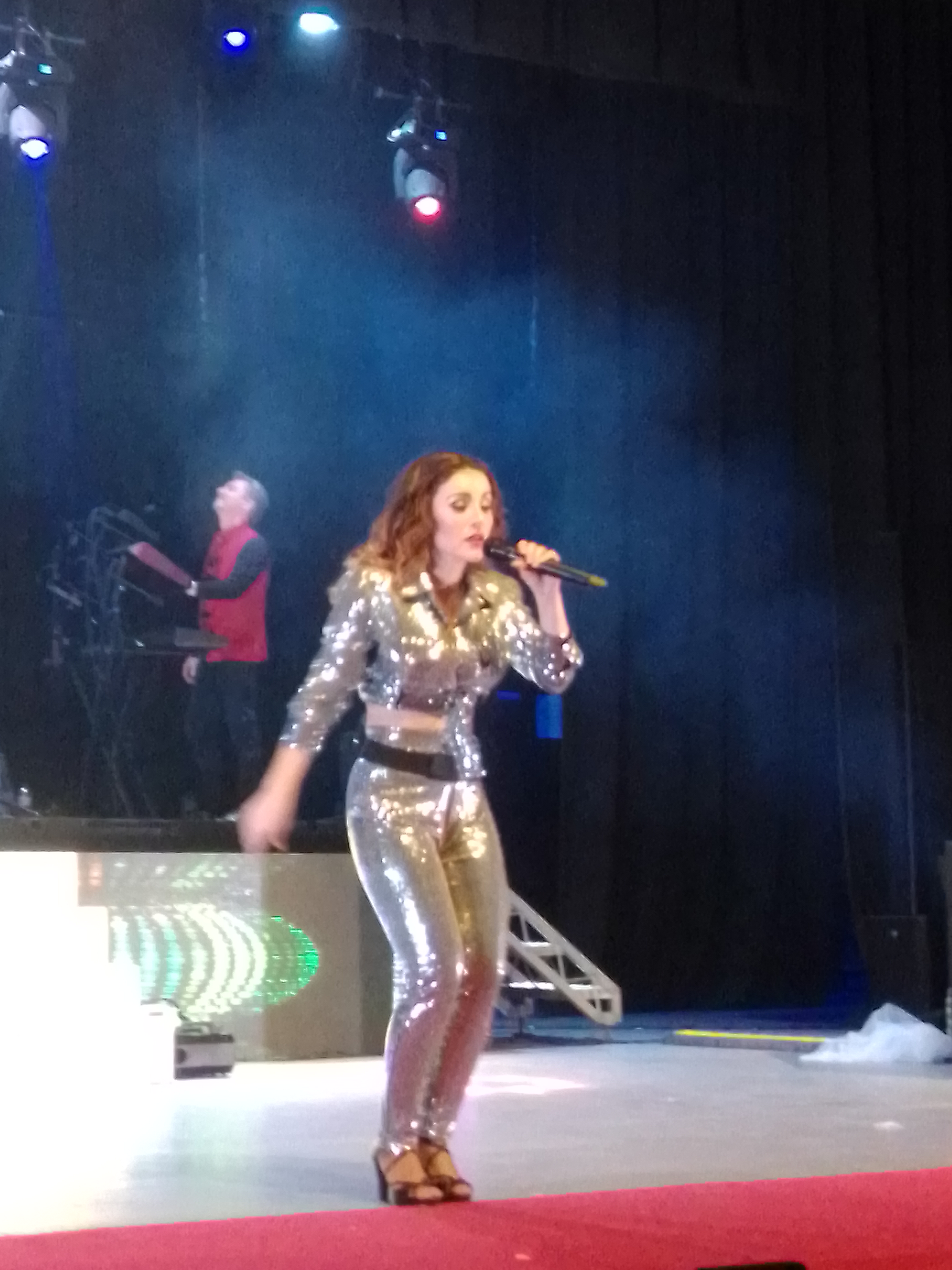 Remember tributo a Madonna. Remember, Live Tribute to Madonna es un homenaje a la indiscutible Reina del Pop. A través de 4 bloques (Años 80 / Años 90 / Años 2000 / Última era), el espectáculo hace un repaso de la carrera de la artista más exitosa de los últimos tiempos. Un espectacular elenco de bailarines y músicos acompaña a la actriz y cantante Claudia Molina, que interpretará en directo a la Ambición Rubia en un original show.